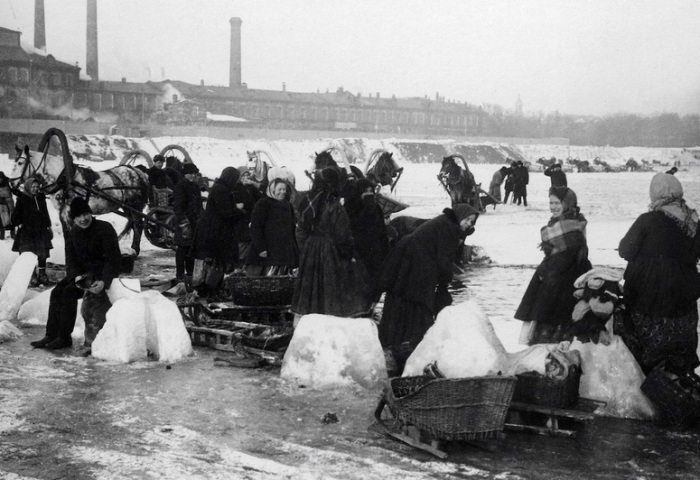 Колка льда у Трёхгорной мануфактуры